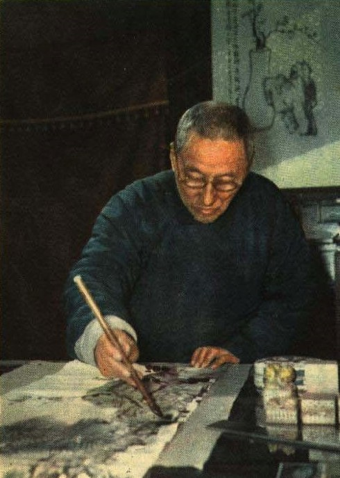 1962-03 1962年 国画家半丁老人